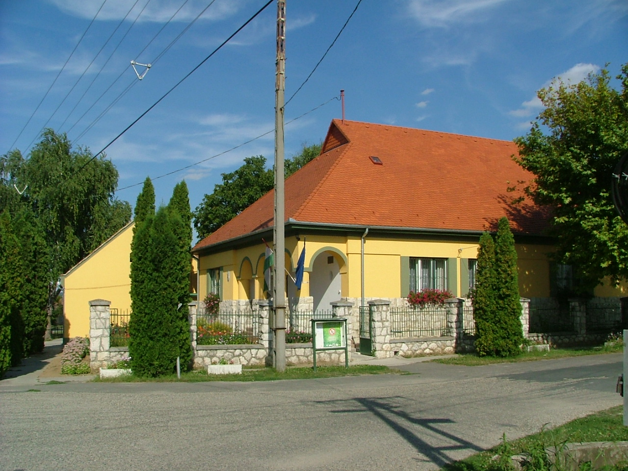 A győrszemerei községháza